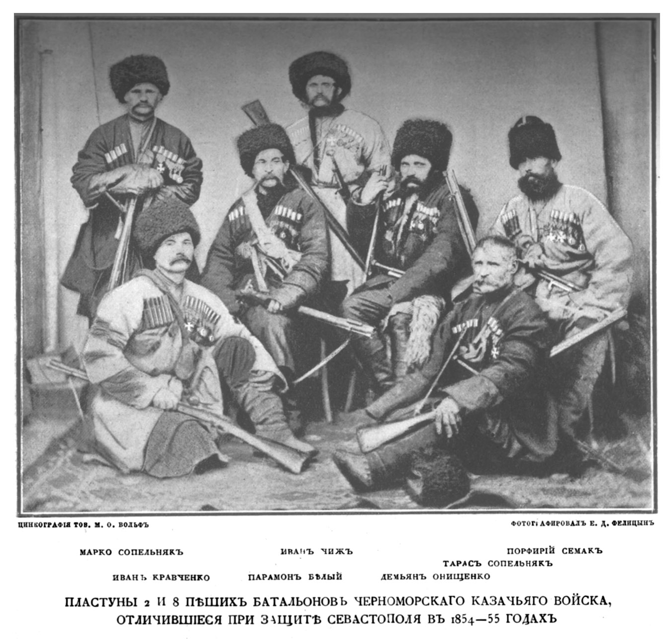 Фотография второй половины XIX века с изображением пластунов Черноморского казачьего войска, отличившихся при защите Севастополя в 1854-1855 гг